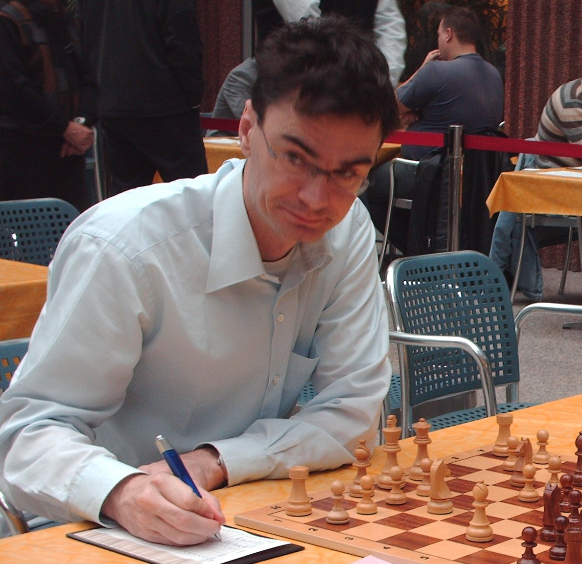 Loek van Wely am 29. Oktober 2006 bei einem Bundesliga-Wettkampf in Berlin-Tegel